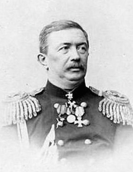 Бутаков Алексей Иванович